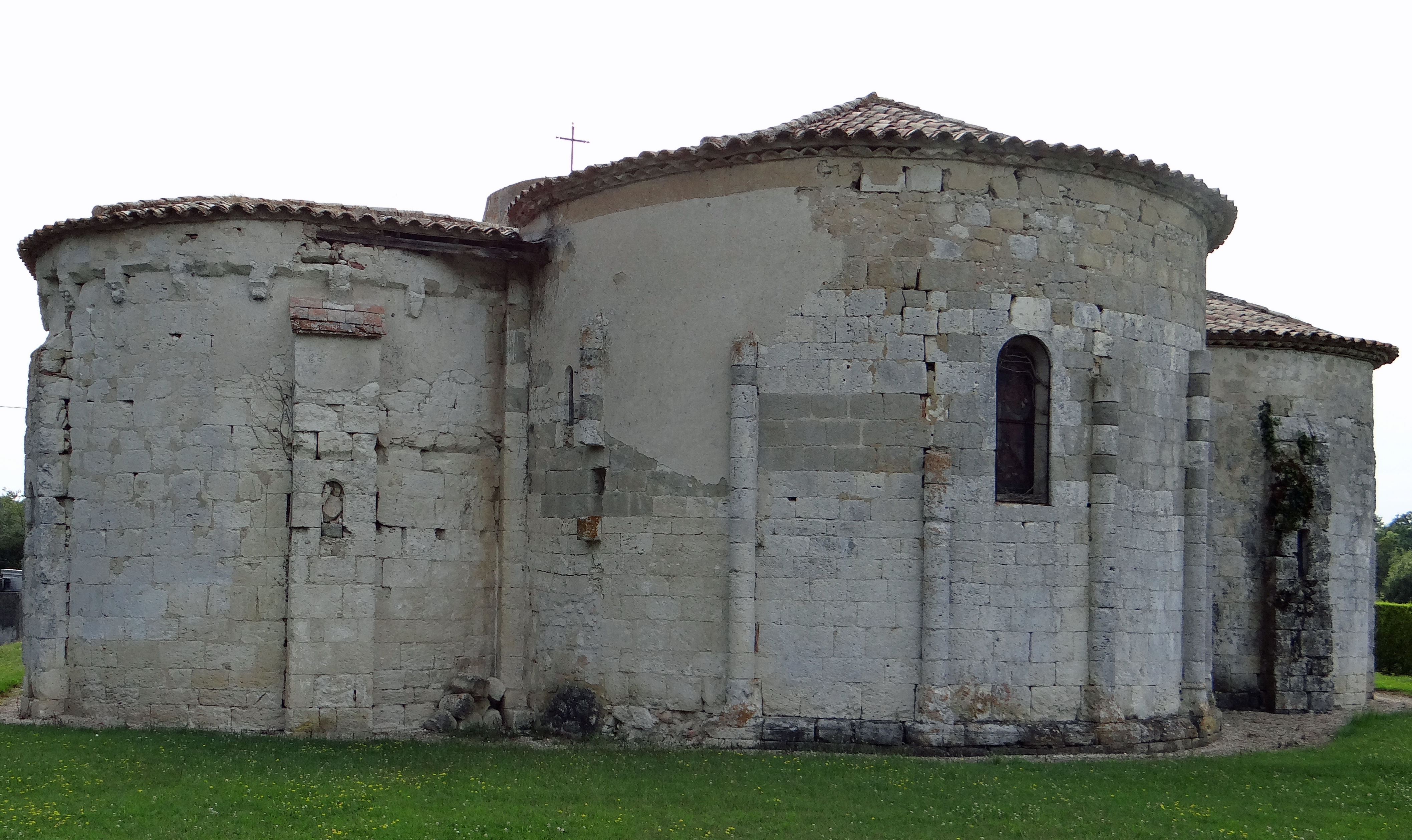 Lauzun - Église Saint-Pastour de Queyssel - Chevet avec l'abside et les deux absidioles